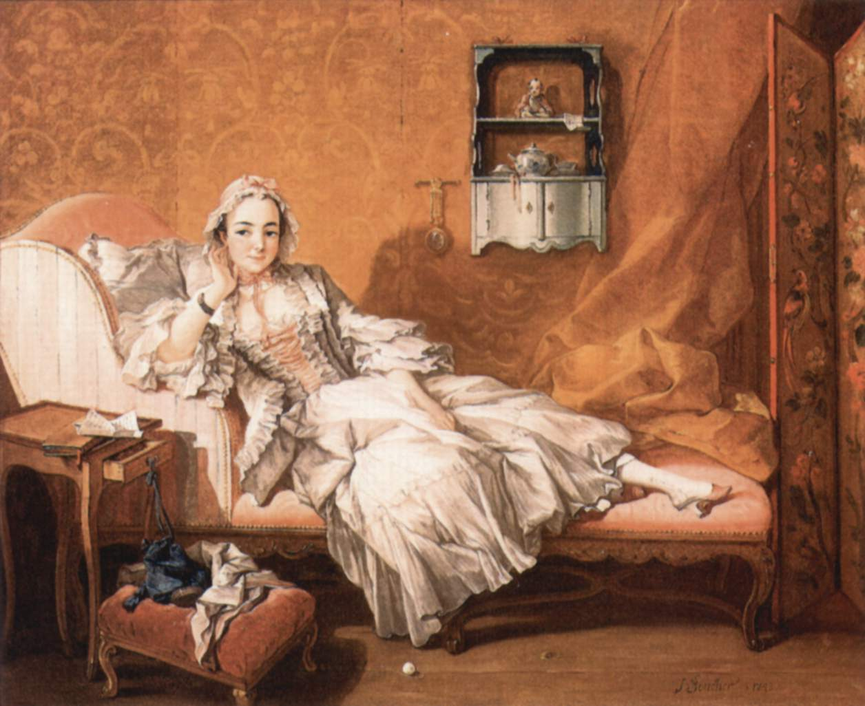 Marie-Jeanne Buzeau était la femme de Boucher et lui servait fréquemment de modèle